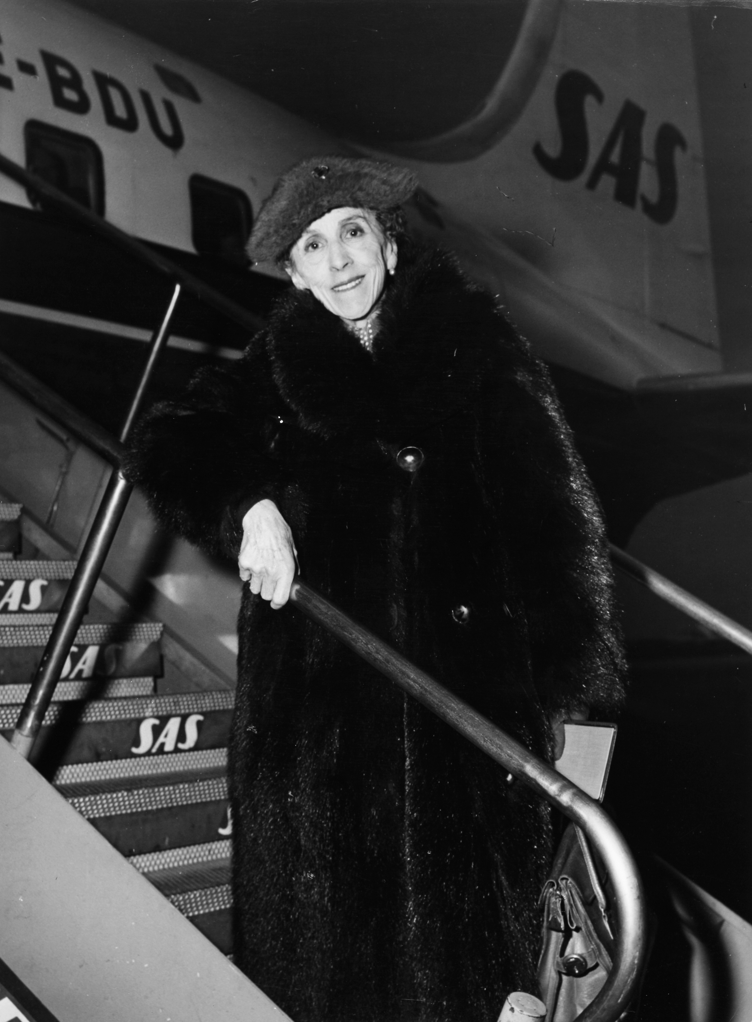 Baroness Karen Blixen-Finecke at Kastrup Airport CPH, Copenhagen 1957-11-02.